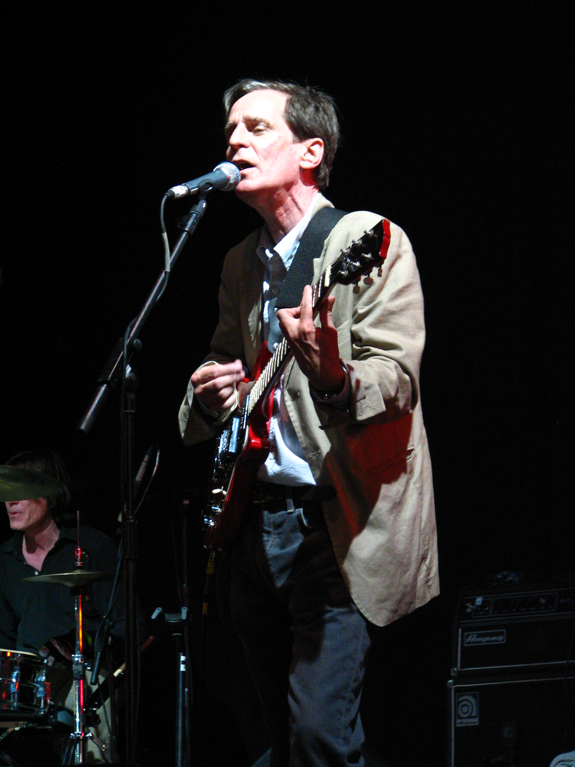 Big Star on stage at Hyde Park, London, UK